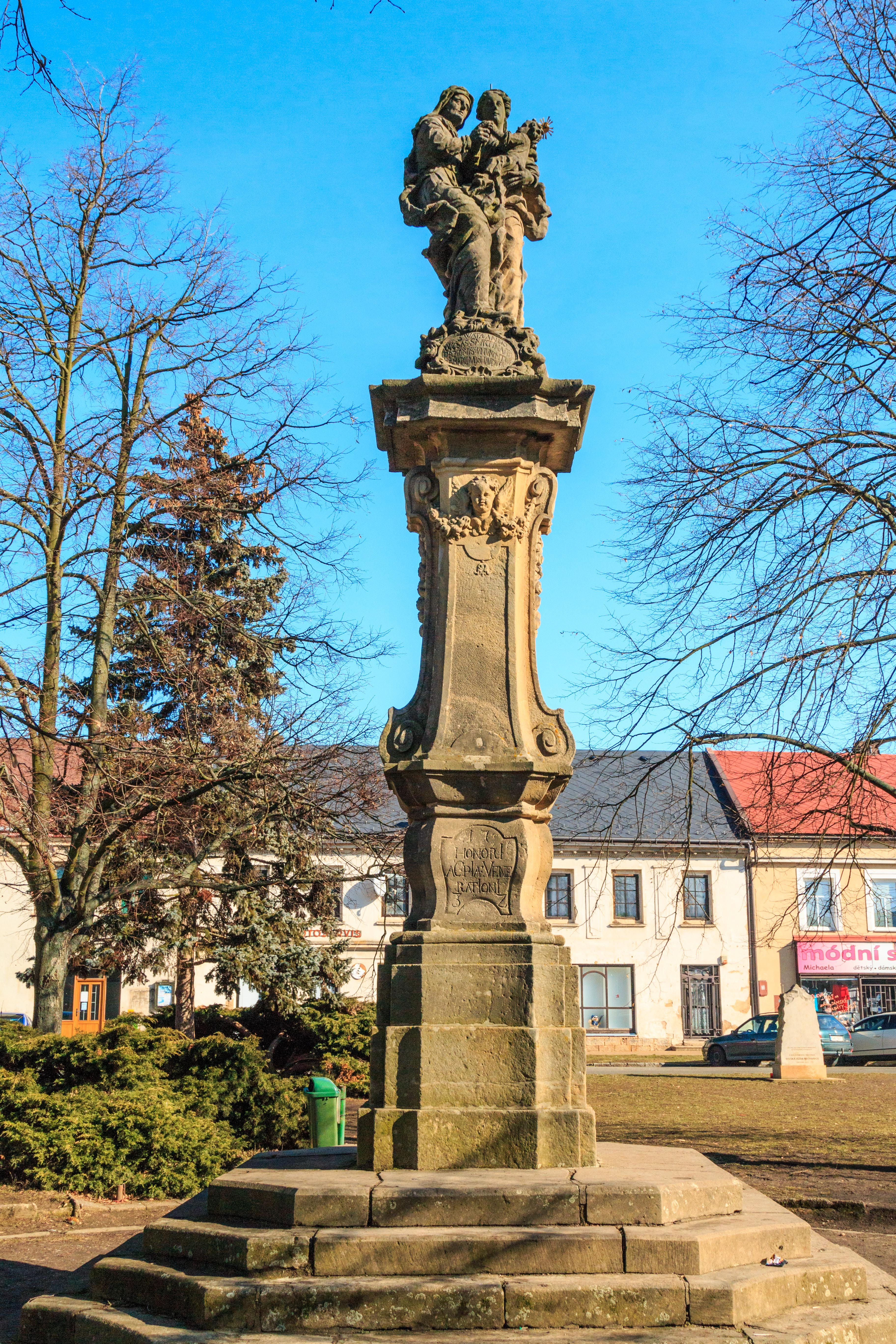 Sloup se sochou svaté Anny, nám. Husovo, Nechanice, Nechanice.